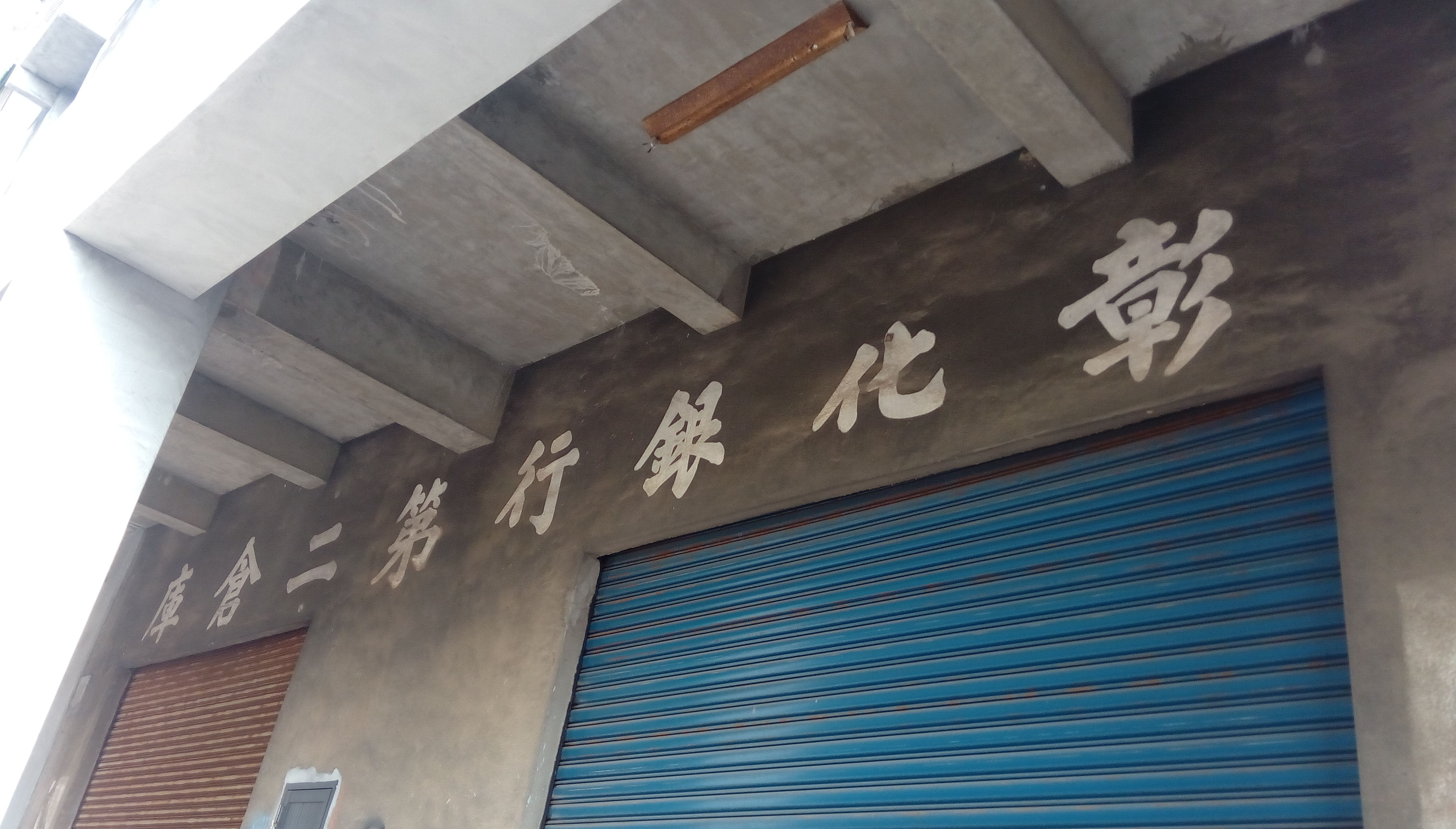 高雄市鹽埕區瀨南街，彰化銀行第二倉庫。